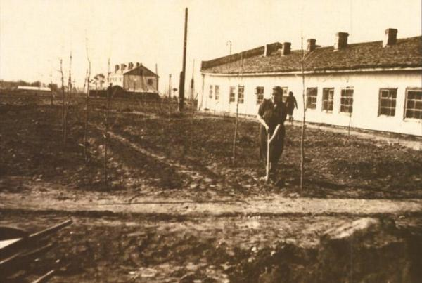 Место будущего деривационного канала в Тушино Place of the future derivational canal in Tushino